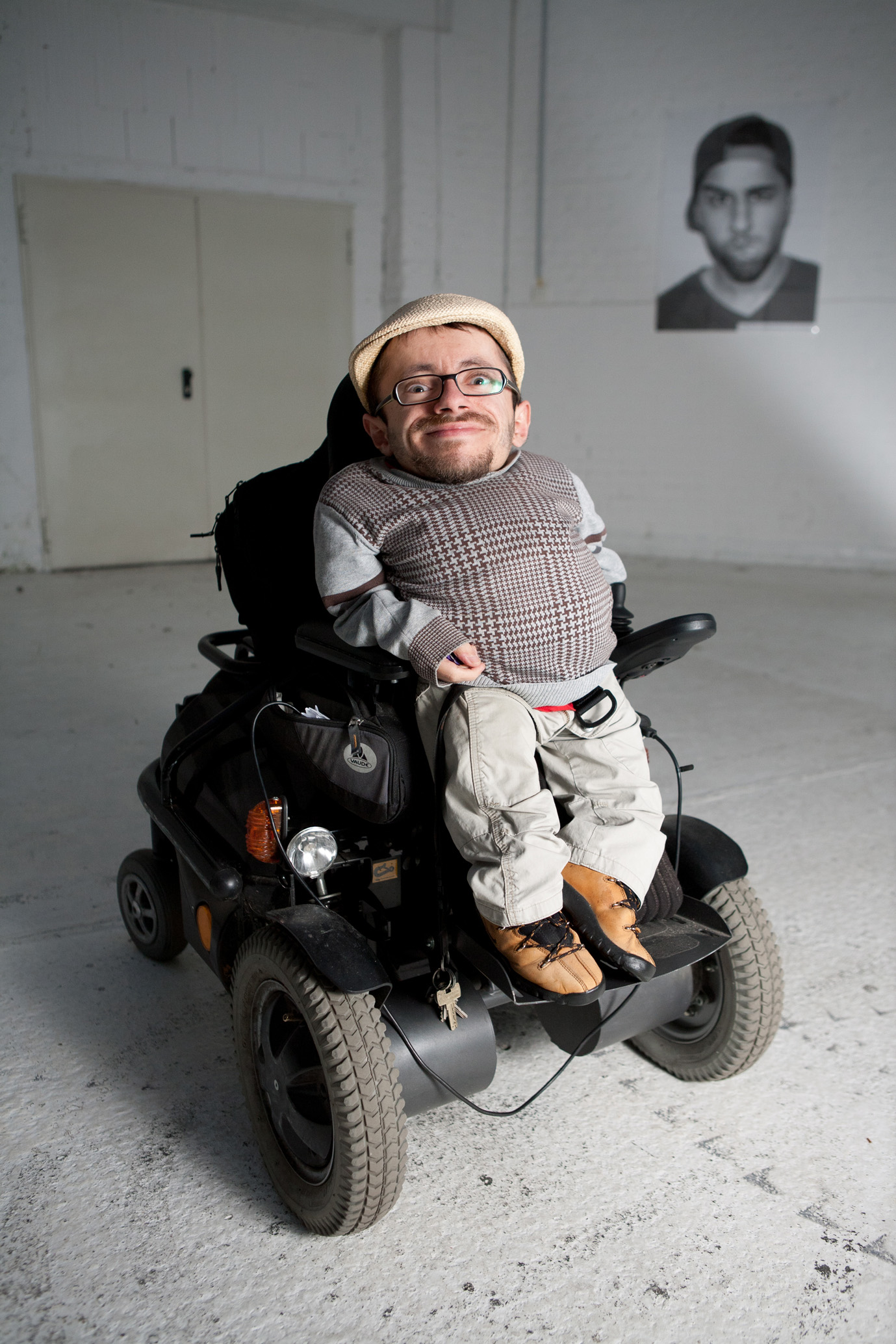 Raul Krauthausen, Gründer von und den SOZIALHELDEN e.V.